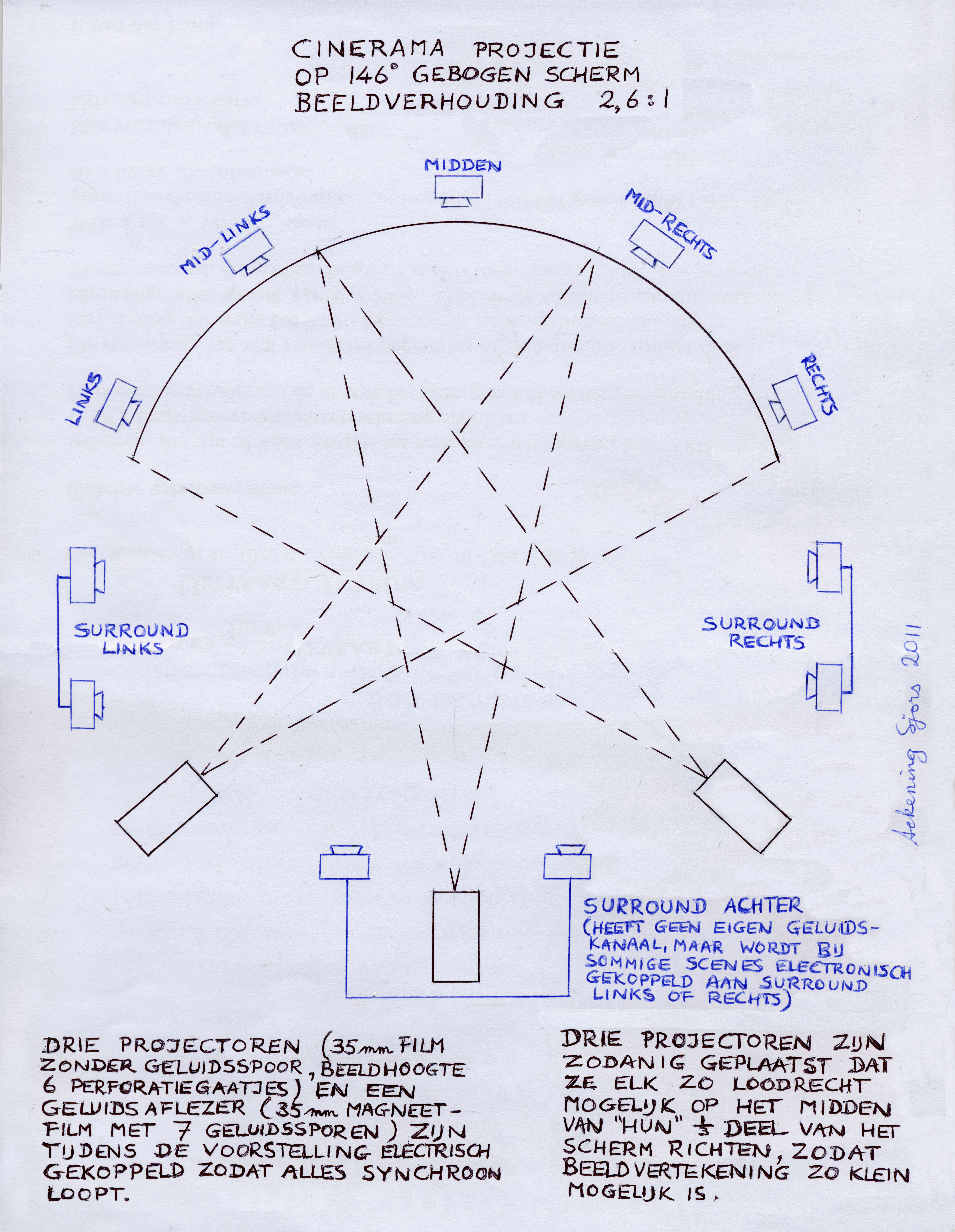 Schematische tekening van oorspronkelijk (1952) Cinerama projectie-systeem met drie gekoppelde filmprojectoren op een zeer groot, sterk gebogen projectiescherm. Schematic drawing of original (1952) Cinerama projection system with three interlocked film projectors on a very large, deeply curved projection screen.